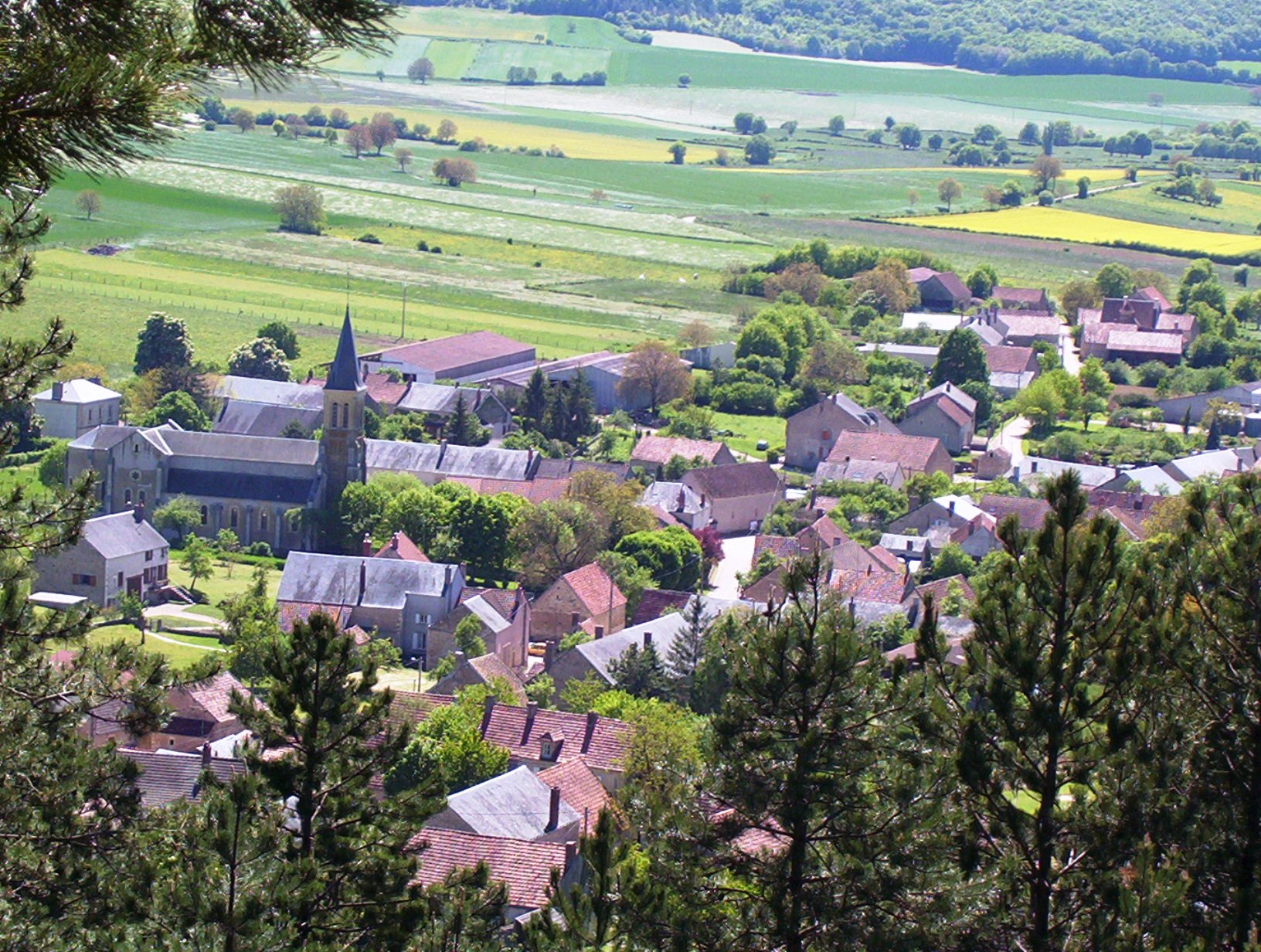 Village de Grenois, l'église est visible.